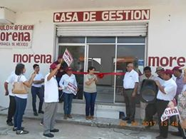 Sede de MORENA en el Municipio de Jesus Carranza Veracruz Mexico